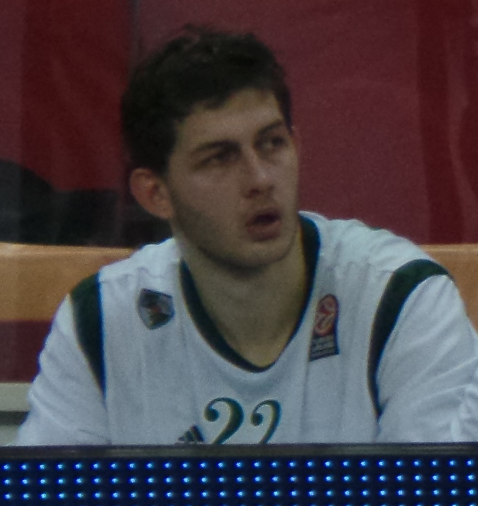 Mindaugas Kupšas